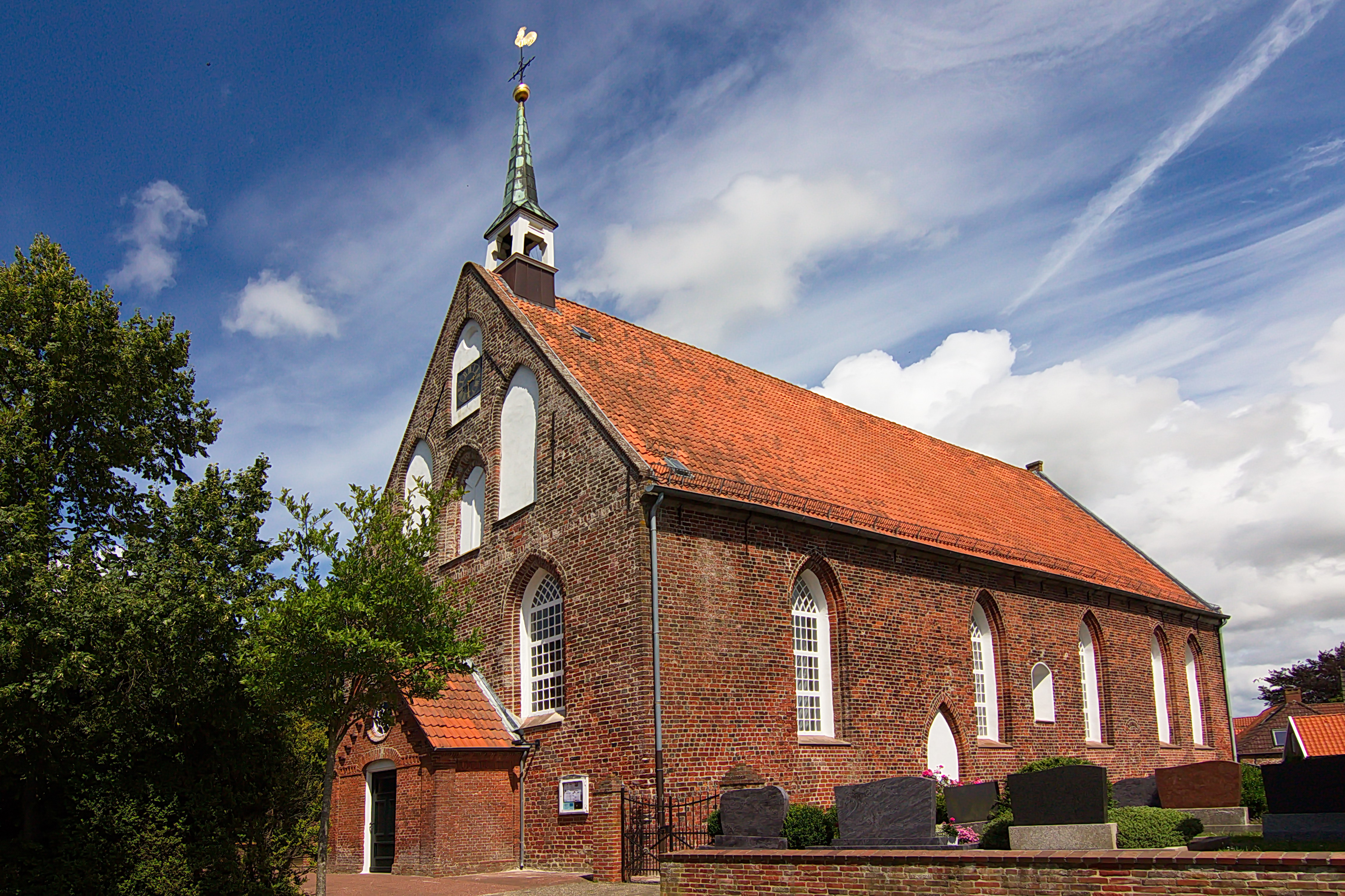 Kirche Manslagt (Krummhörn), Niedersachsen, Deutschland